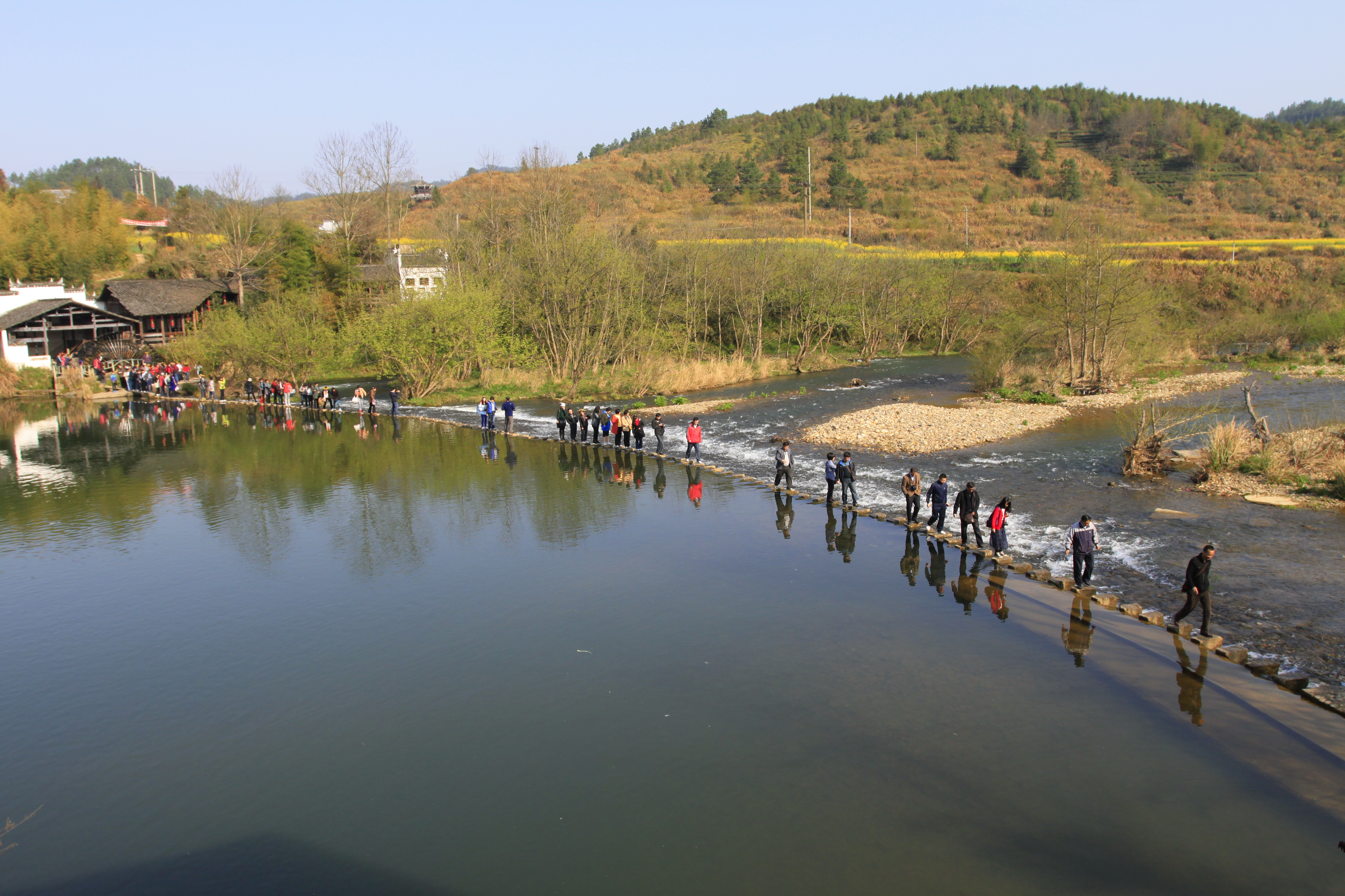 清华彩虹桥下游矴步，位于中国江西省婺源县清华镇。